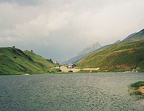 Colle della Maddalena/Col de Larche picture taken by user Idéfix in 1998